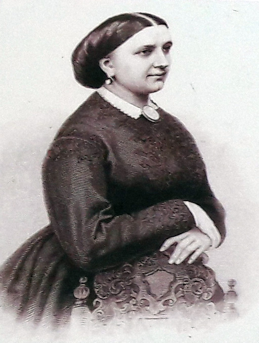 Porträt von Louise Hauffe auf der Gedenktafel im Kurpark Bad Düben